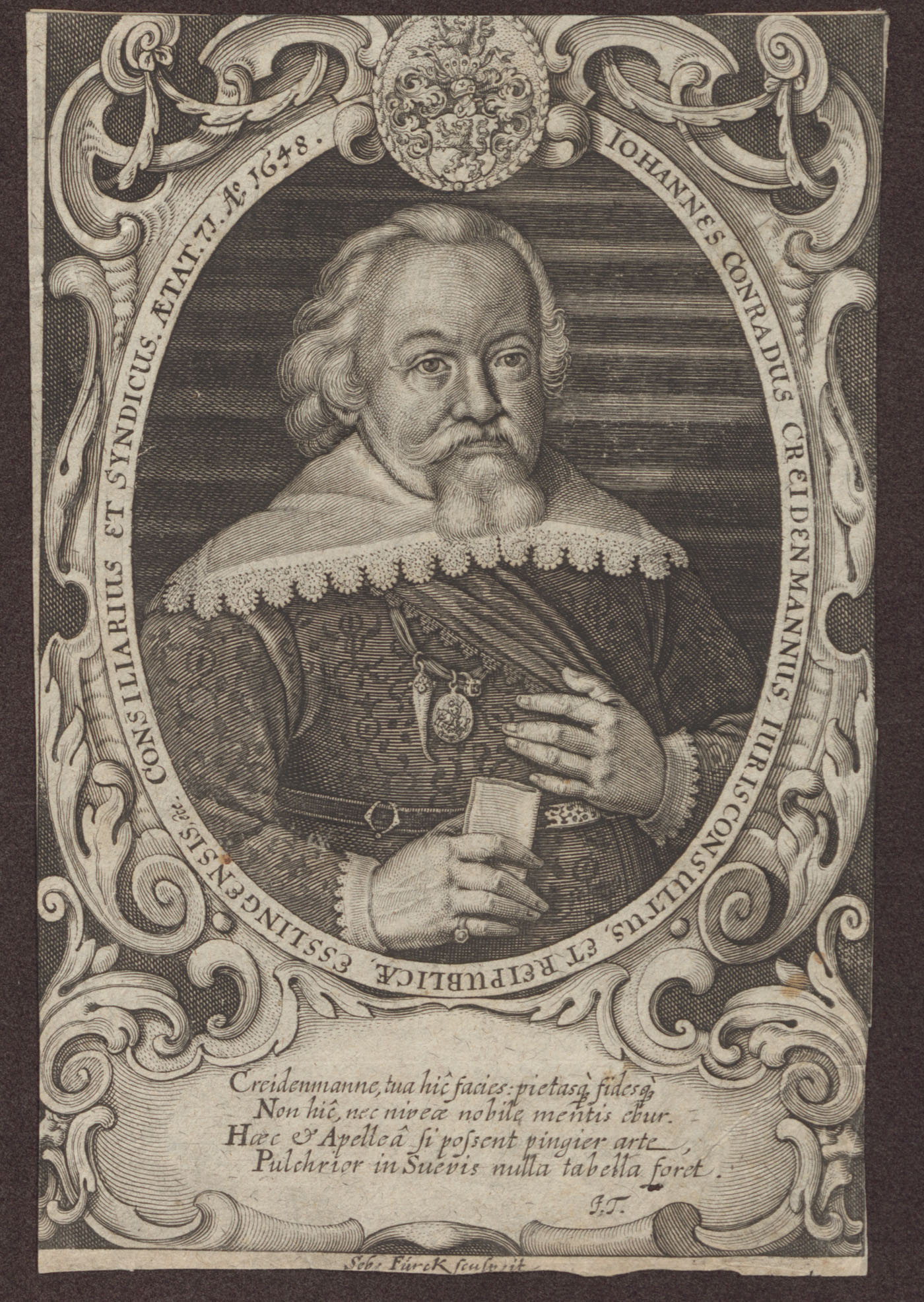 Titel Kreidenmann, Johann Conrad Künstler / Stecher / Fotograf Furck, Sebastian Provenienz 0_Portrait Kön. Kupferstichcabinet Stuttgart / Kunsthistorisches Institut Tübingen / Univ. Bibl. Tübingen Datierung vor 1655 Dargestellte Person Johann Conrad Kreidenmann (1576 - 1655), deutscher Jurist, Dr. jur., Konsulent der Reichsritterschaft in Schwaben am Kocher, Ratsherr, Advokat und Syndikus in Esslingen PND ID 100203086 (Dargestellter) Verlagsort Stuttgart Verleger / Drucker Rösslin d.J., Johann Weyrich Technik 0_portrait Kupferstich Material / Bildträger 0_portrait Papier Wasserzeichen Nein Maße (mm) Bl. 195x130 Bild 193x130 Schlagwörter 0_PortraitMannDeutschland Rechtsanwalt 0_PortraitMannDeutschland Jurist 0_PortraitMannDeutschland Ratsherr Schule deutsch Werkverz.-Nr. Nicht in Singer Besitzende Institution Besitzende Institution 0_Portrait Universitätsbibliothek Tübingen (UBT) Bemerkung Kontakt: Inventar-Nr. / Signatur PA Alte Signaturen Dd 133 b 2° Kommentar Aus der Leichenpredigt: Inscriptio Funebris De Laudato Kreidenmanno Viro Pio, Justo, Bono, Docto, Stuttgart 1655. UBT Signatur: L XVI 138.4 easydb4 ID 50751